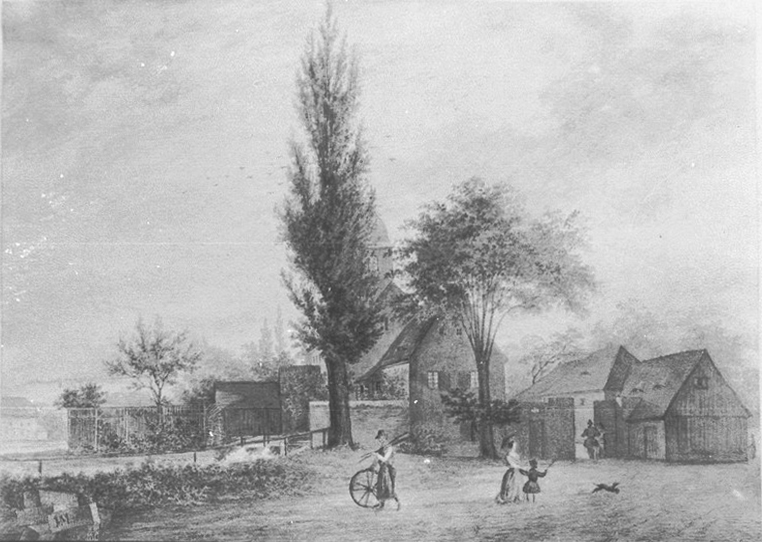 Ehemaliges Kanonenbohrwerk an der Weißeritz ("vor dem Freiberger Schlage") Dresden Löbtau